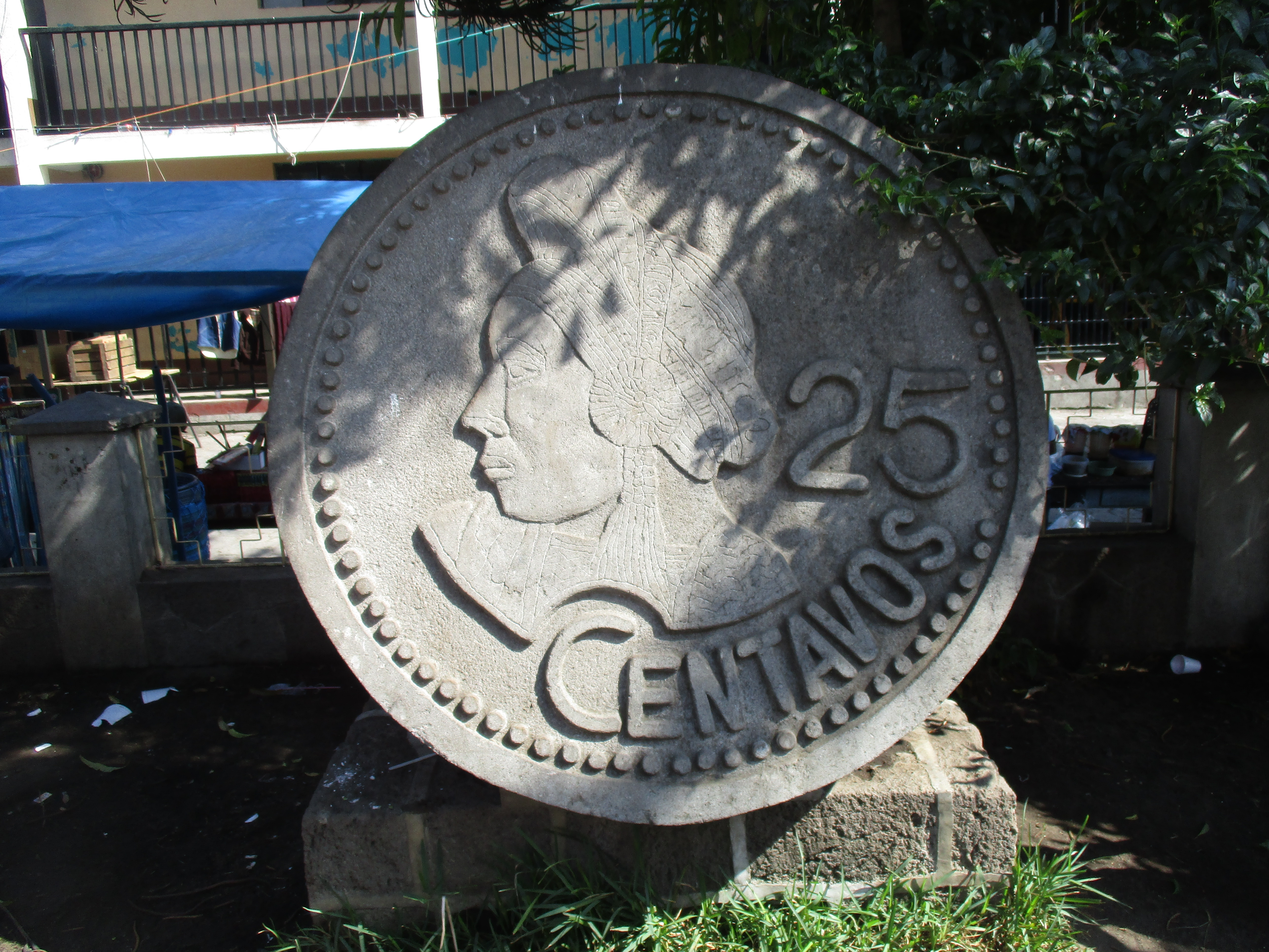 Estàtua d'una moneda de 25 centaus amb la imatge d'un líder amerindi al parc central de Santiago Atitlán, Sololá, Guatemala